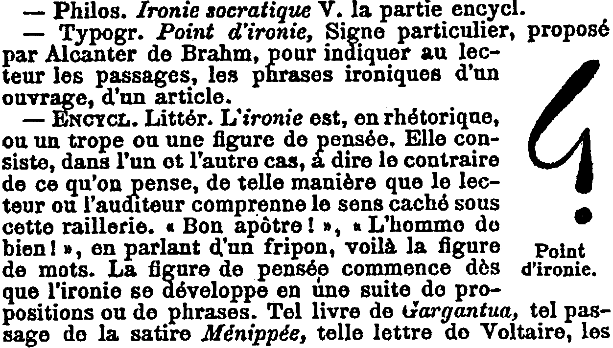 « Ironie », in: Nouveau Larousse illustré, publié sous la direction de Claude Augé, Paris, Larousse, 1897–1905, t. V., p. 329